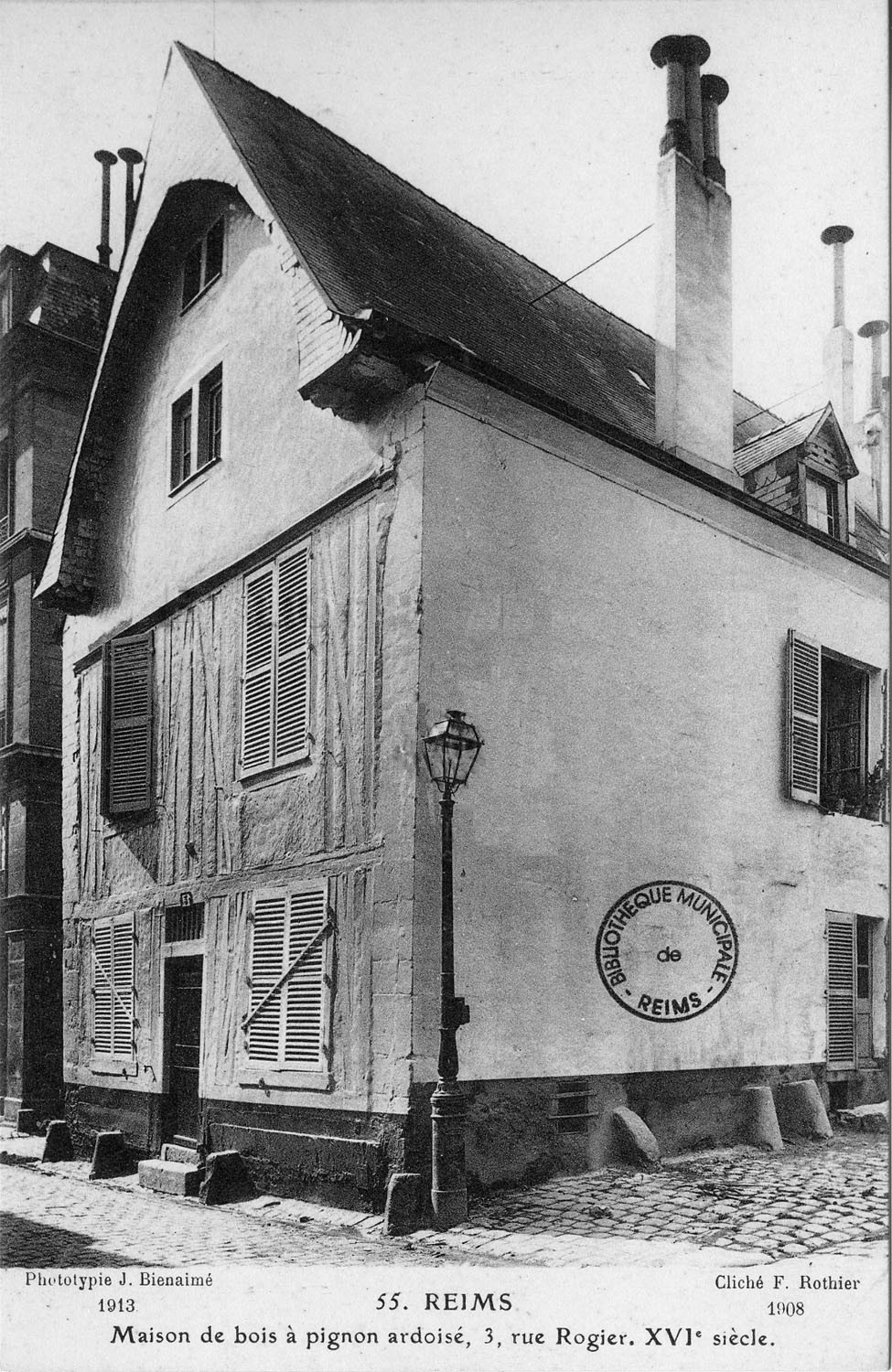 à Reims.